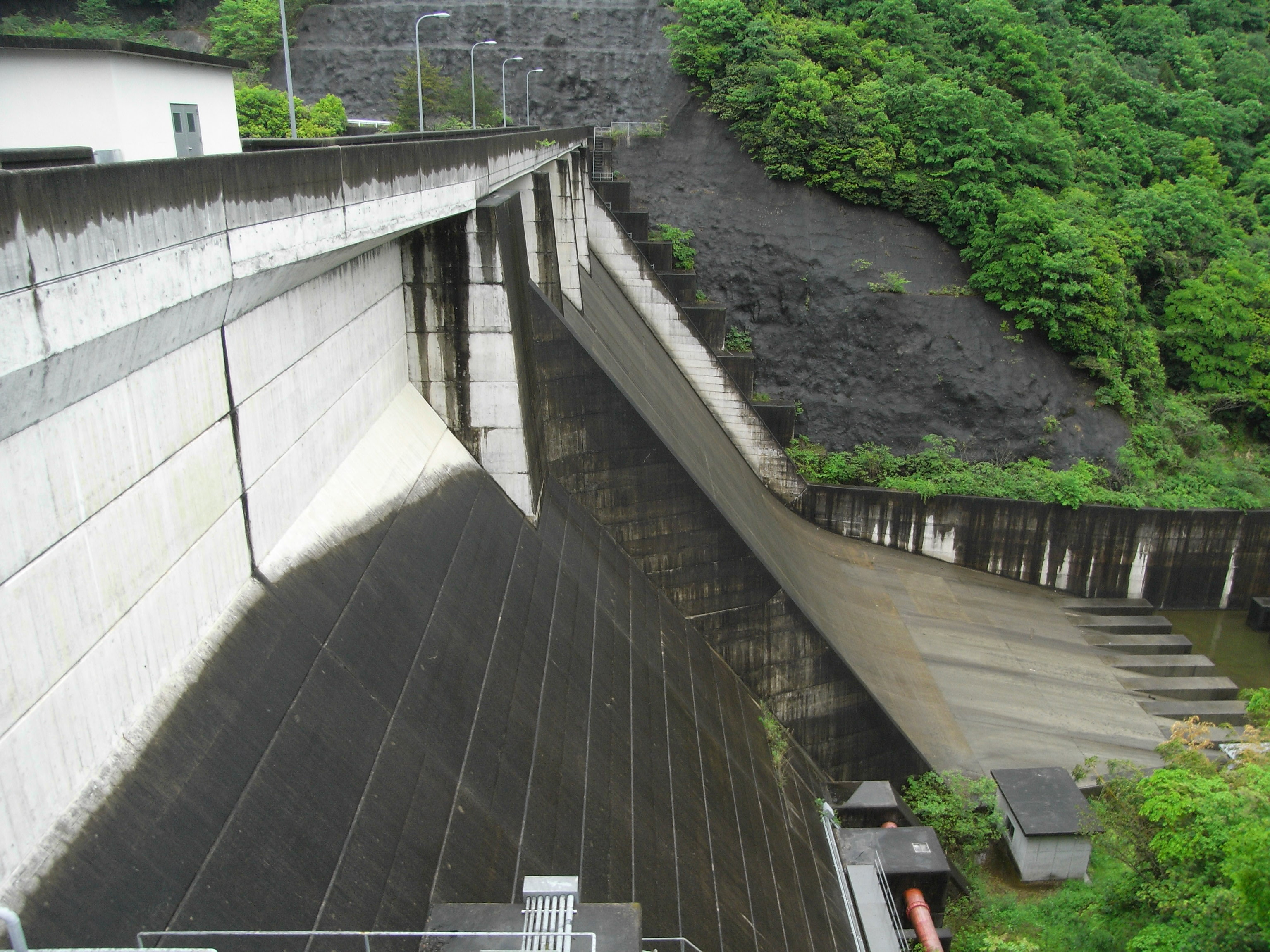 Dam